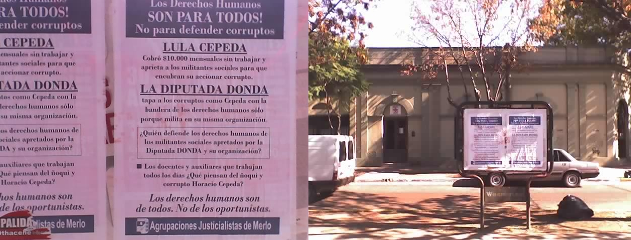 Panfletos contra la diputada Victoria Donda, pegados en la vía pública.